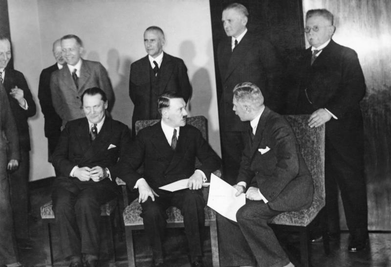 Ein interessanter Rückblick auf das ereignissreiche Jahr der Nationalen Erhebung in Deutschland vom 30. Januar 1933 bis jetzt! Der historische 30. Januar 1933 in Berlin. Nach der ersten Sitzung des neuen Reichkabinetts unter dem Vorsitz des Reichskanzlers Adolf Hitler um 1/2 7 Uhr Abends in der Reichskanzlei. In der ersten Reihe von links nach rechts: Ministerpräsident Hermann Göring, Reichskanzler Adolf Hitler, und Vizekanzler v. Papen. In der zweiten Reiche von links nach rechts: Reichsminister v. Schwerin-Krossik, Reichsinnenminister Dr. Frick, Reichswehrminister v. Blomberg, und der ehem. Reichsernährungsminister Dr. Hugenberg. Information added by Wikimedia users.Kabinett Hitler 30. Januar 1933 - 24. März 1933